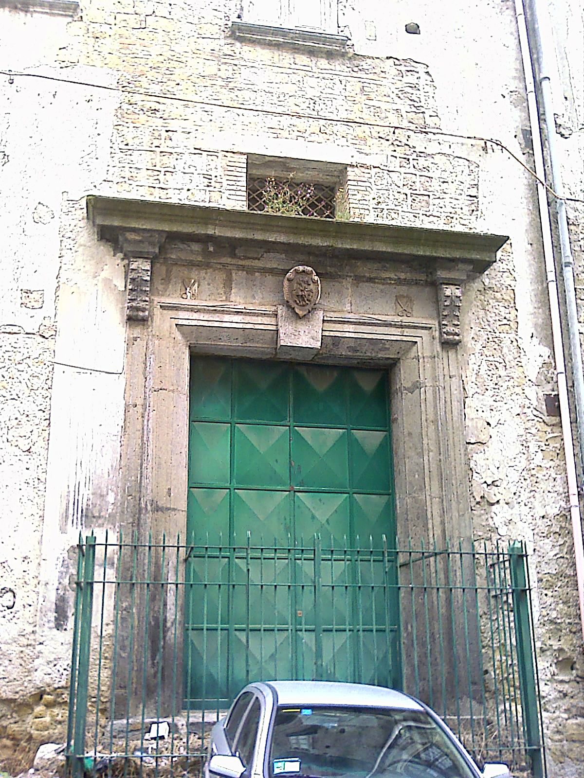 Chiesa dei Santi Michele ed Omobono: altro ingresso